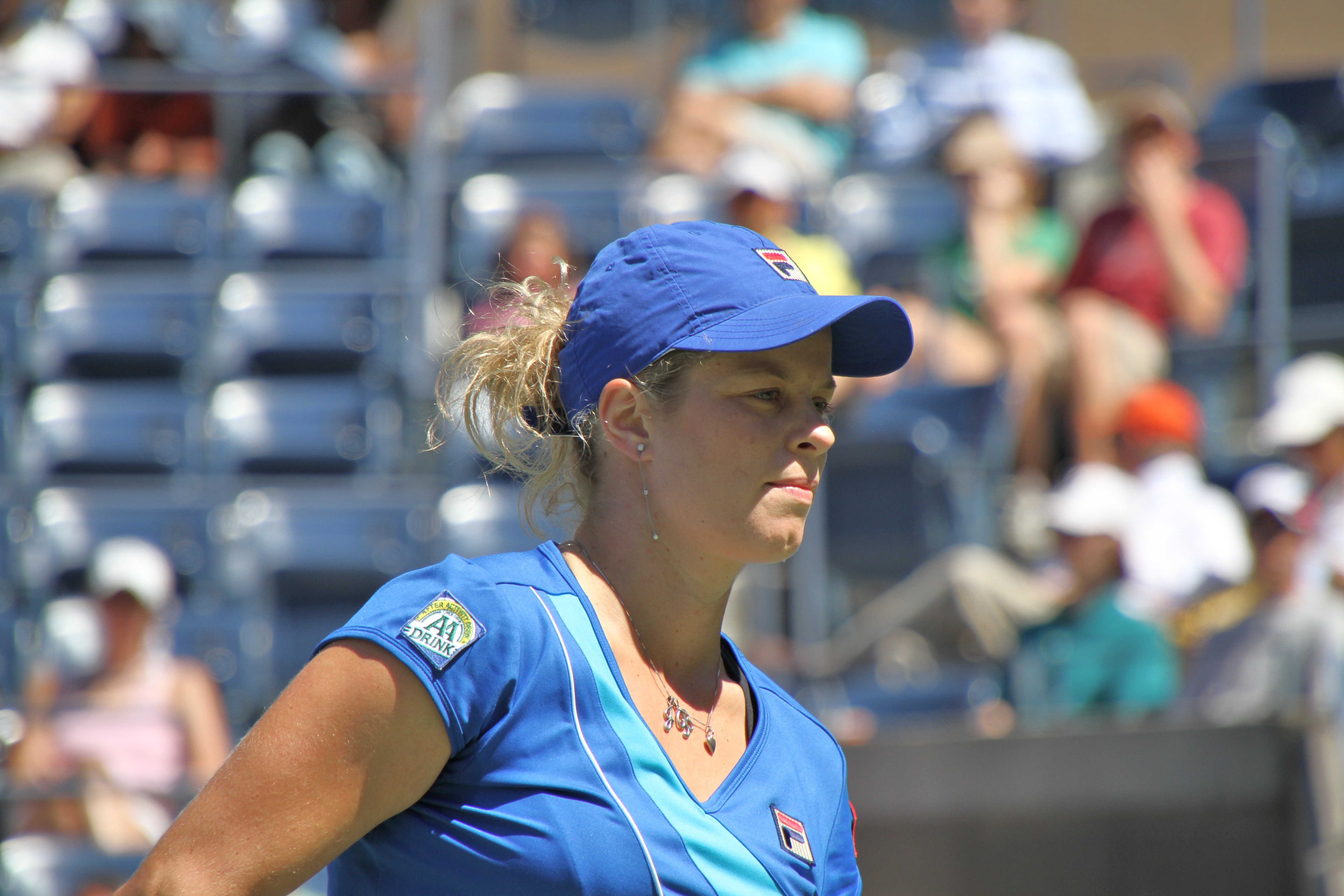 Kim Clijsters